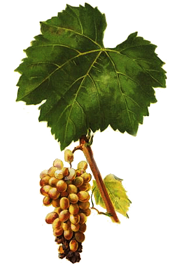 Planche du furmint sur l'Ampélographie Viala et Vermorel